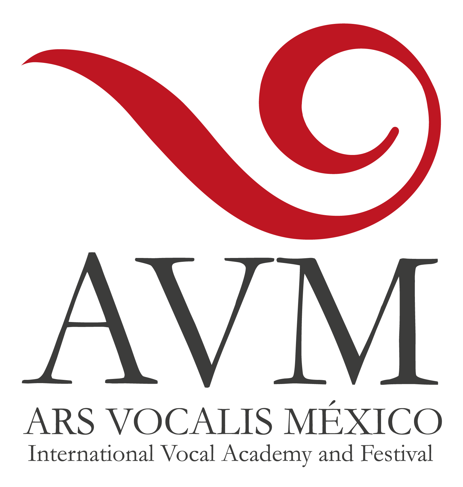 Logo del festival Ars Vocalis